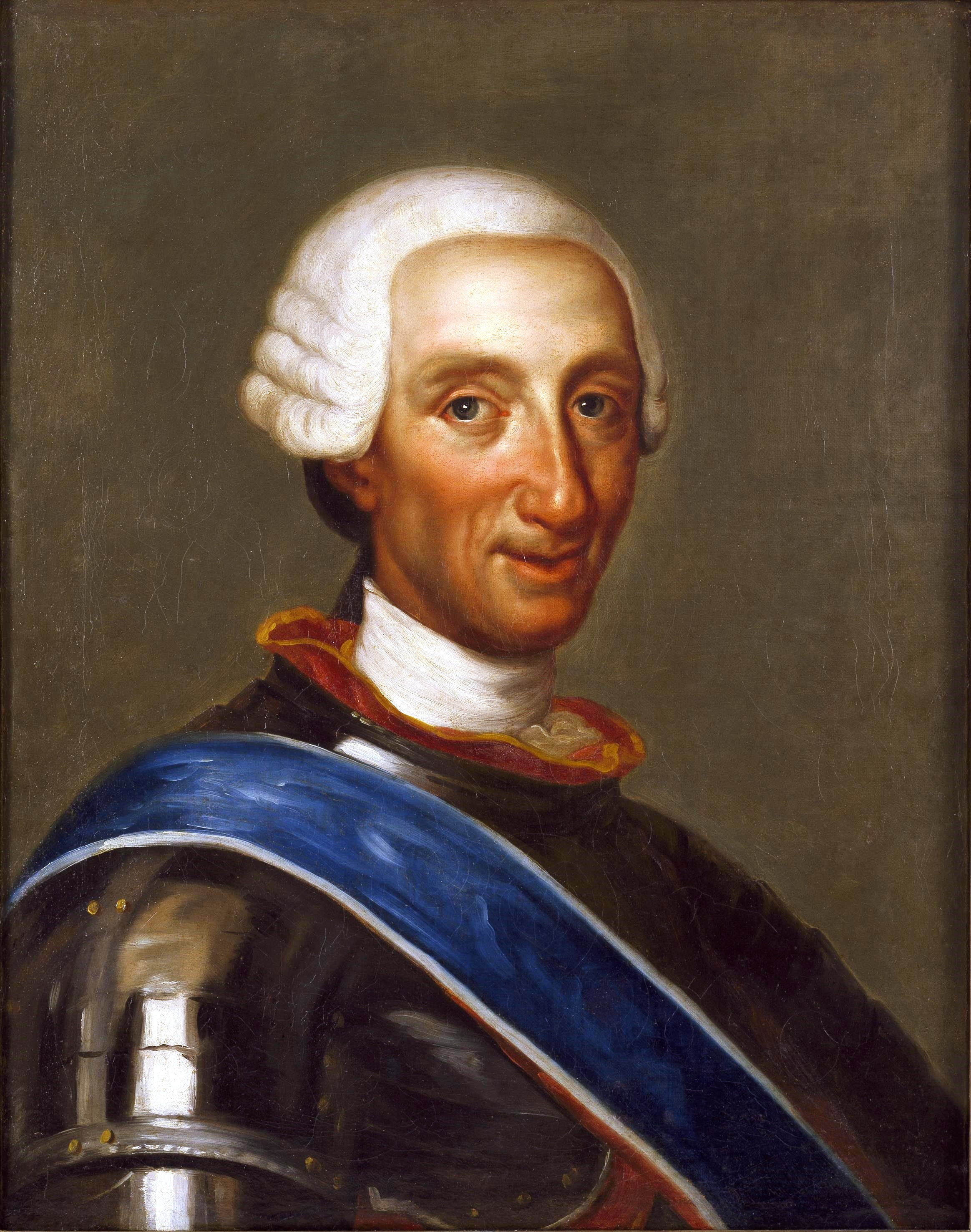 Retrato del rey Carlos III de España (1716-1788), que fue hijo del rey Felipe V de España y hermanastro de Fernando VI, a quien sucedió en el trono español. Esta obra es una copia anónima dieciochesca de un retrato del monarca pintado por Anton Raphael Mengs en dicha centuria.